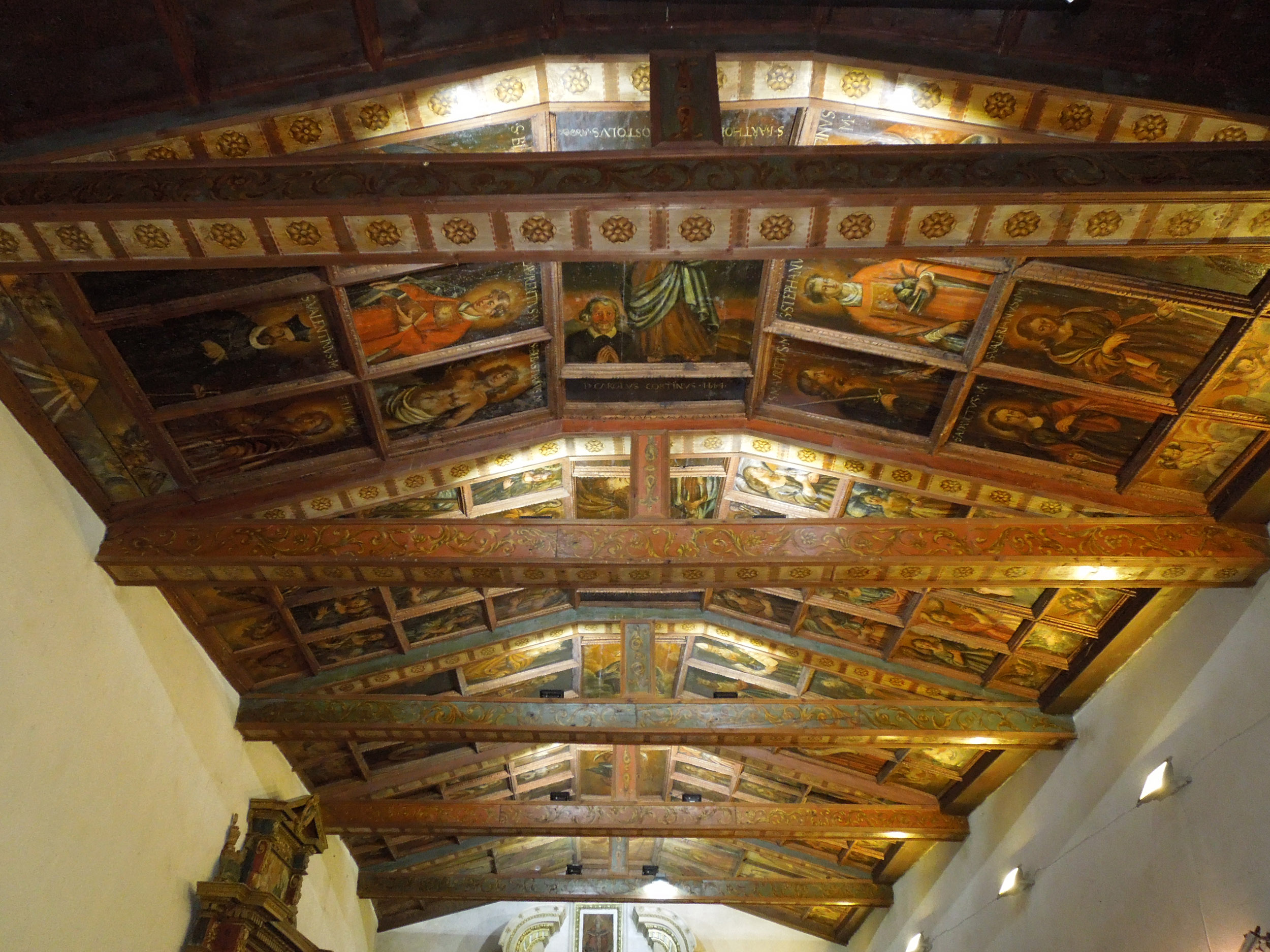 Soffitto ligneo dipinto del 1684 all'interno della chiesa di San Bartolomeo di Villa Popolo in provincia di Teramo.